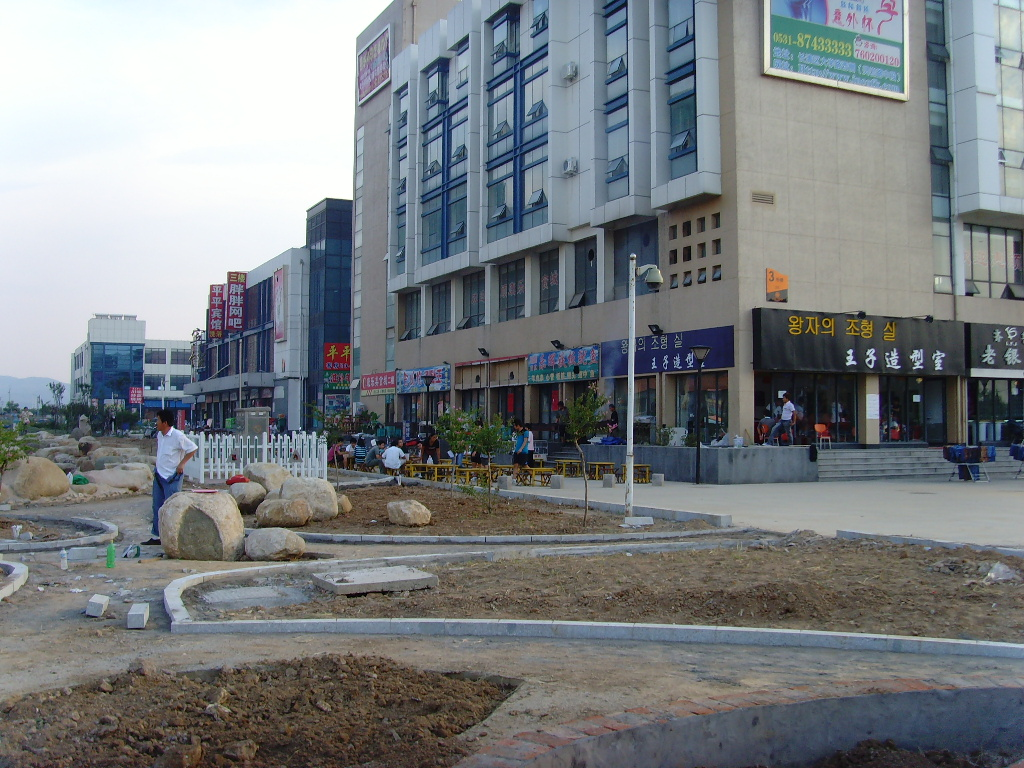 山东，济南，长清区，长清大学城商业街